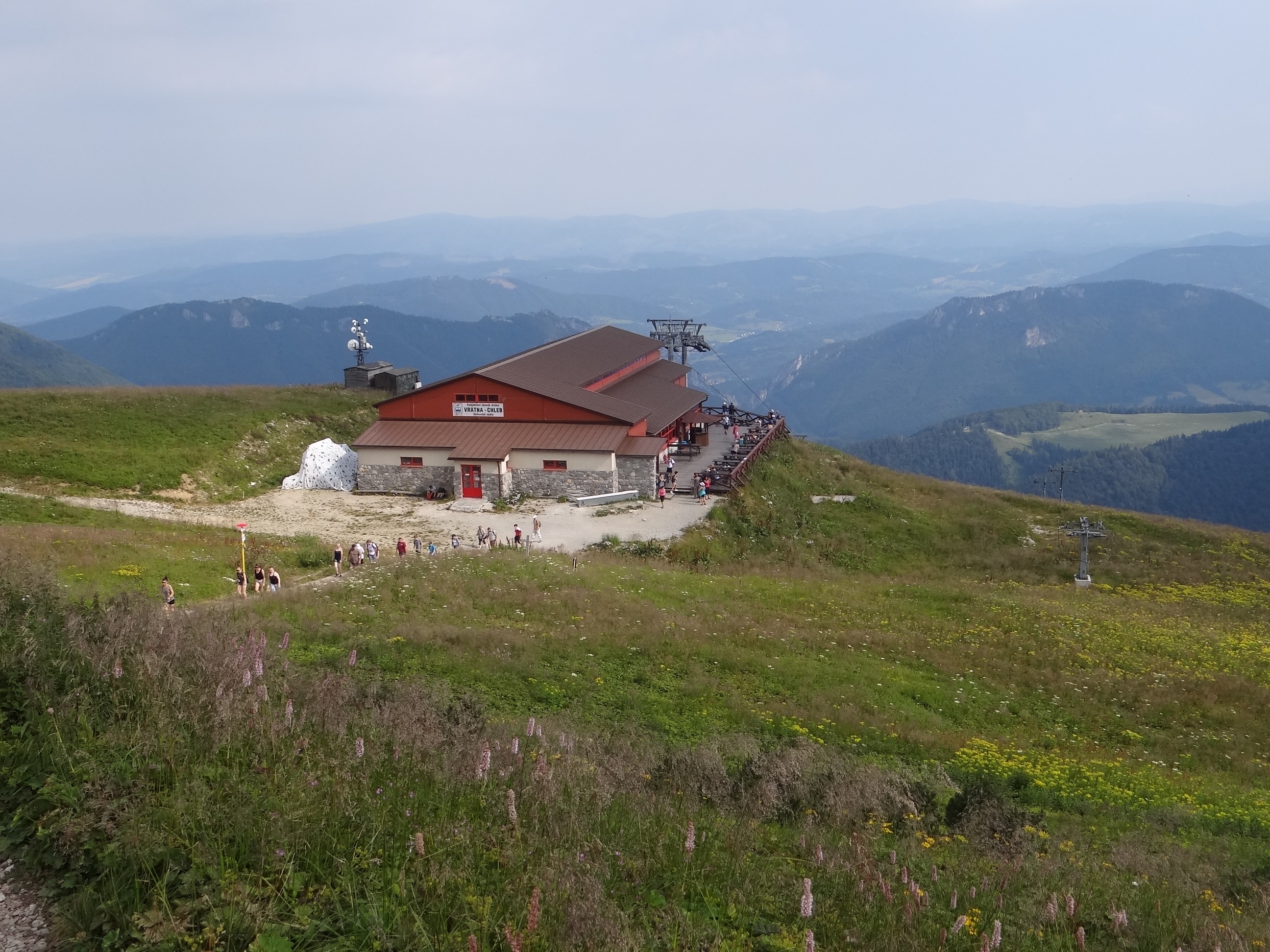 Výtah Vrátna - Chleb (górna stacja kolejki gondolowej Vrátna - Chleb)